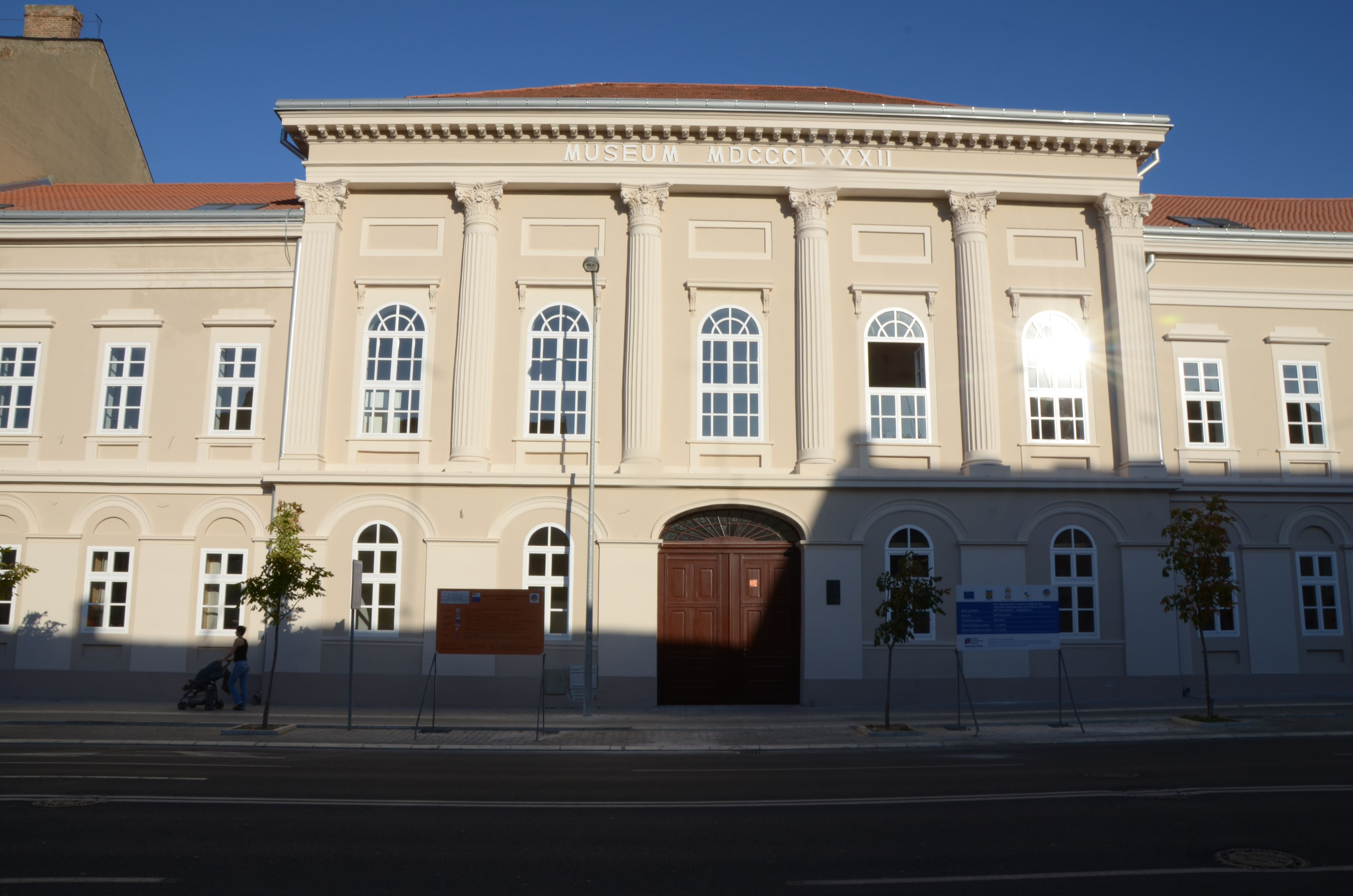 Зграда Конкордија у Вршцу, улица Жарка Зрењанина број 20